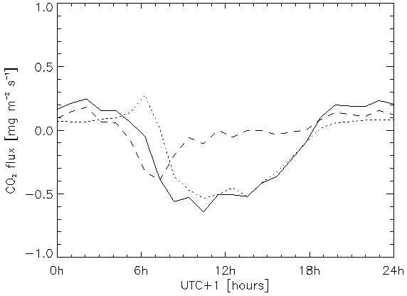 Exemplo de medidas de fluxo de CO2 no período de 24 horas.